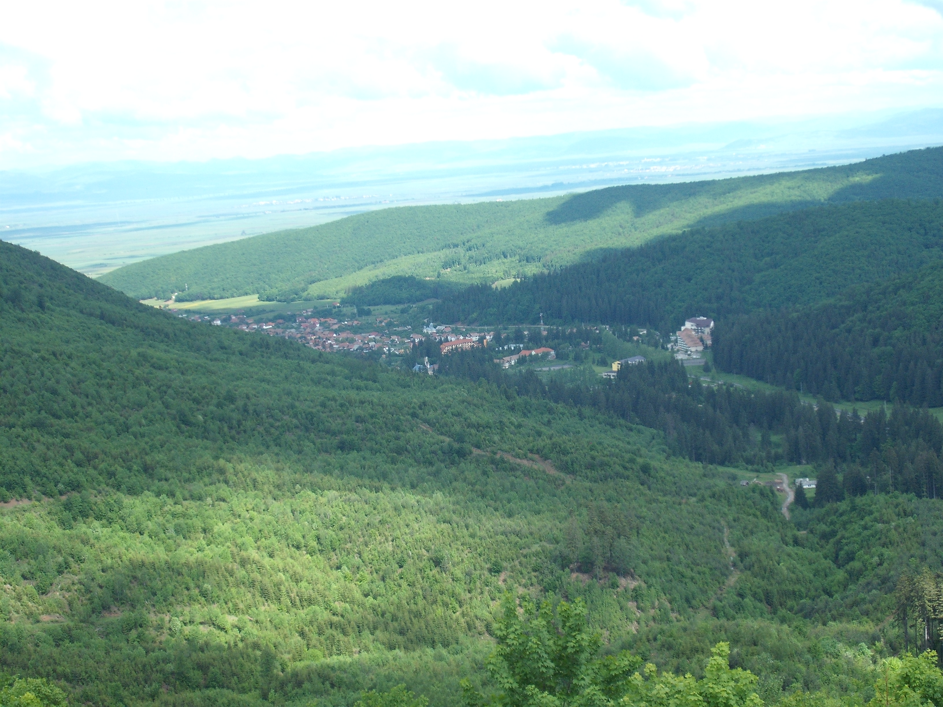 Situl arheologic de la Covasna, "Cetatea Zânelor"